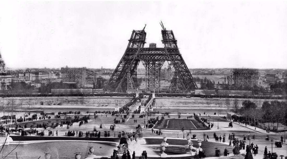 Schwarzweißfotografie des Baufortschritts des Eiffelturms im Jahr 1888